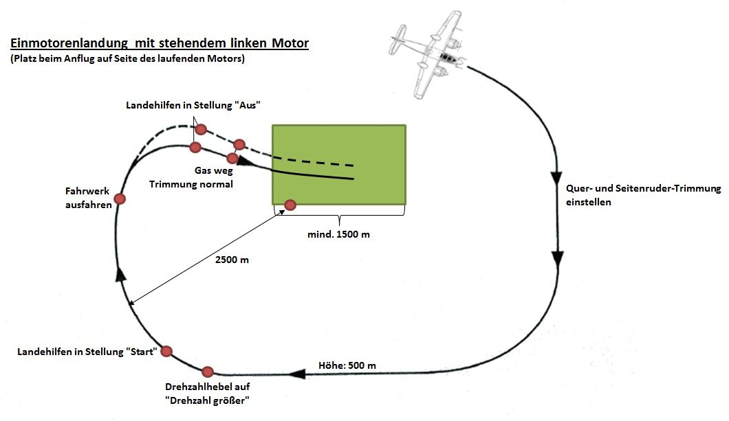 Bedienvorschrift der Focke-Wulf Ta 154. Anweisung zur Einmotorenlandung. (Eigene Nachzeichnung, da das Originaldokument eine sehr schlechte Qualität aufweist.) Originaldokument abgedruckt in Dietmar Hermann: Focke-Wulf Nachtjäger Ta 154 „Moskito“ – Entwicklung, Produktion und Truppenerprobung. Stedinger, Lemwerder 2006, ISBN 3-927697-46-X. S. 177.